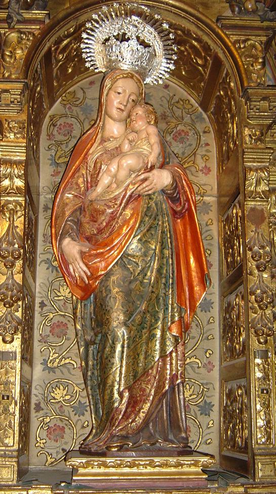 Virgen de las fiebres. Talla renacentista.